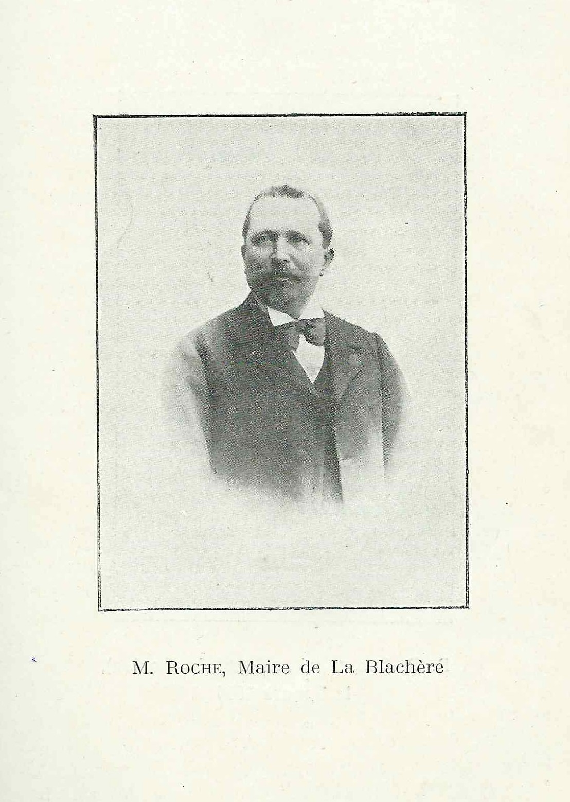 Photo extraite d'une publication de 1903 sur l'expulsion des Oblats de N-D de Bonsecours à Lablachère (Ardèche)